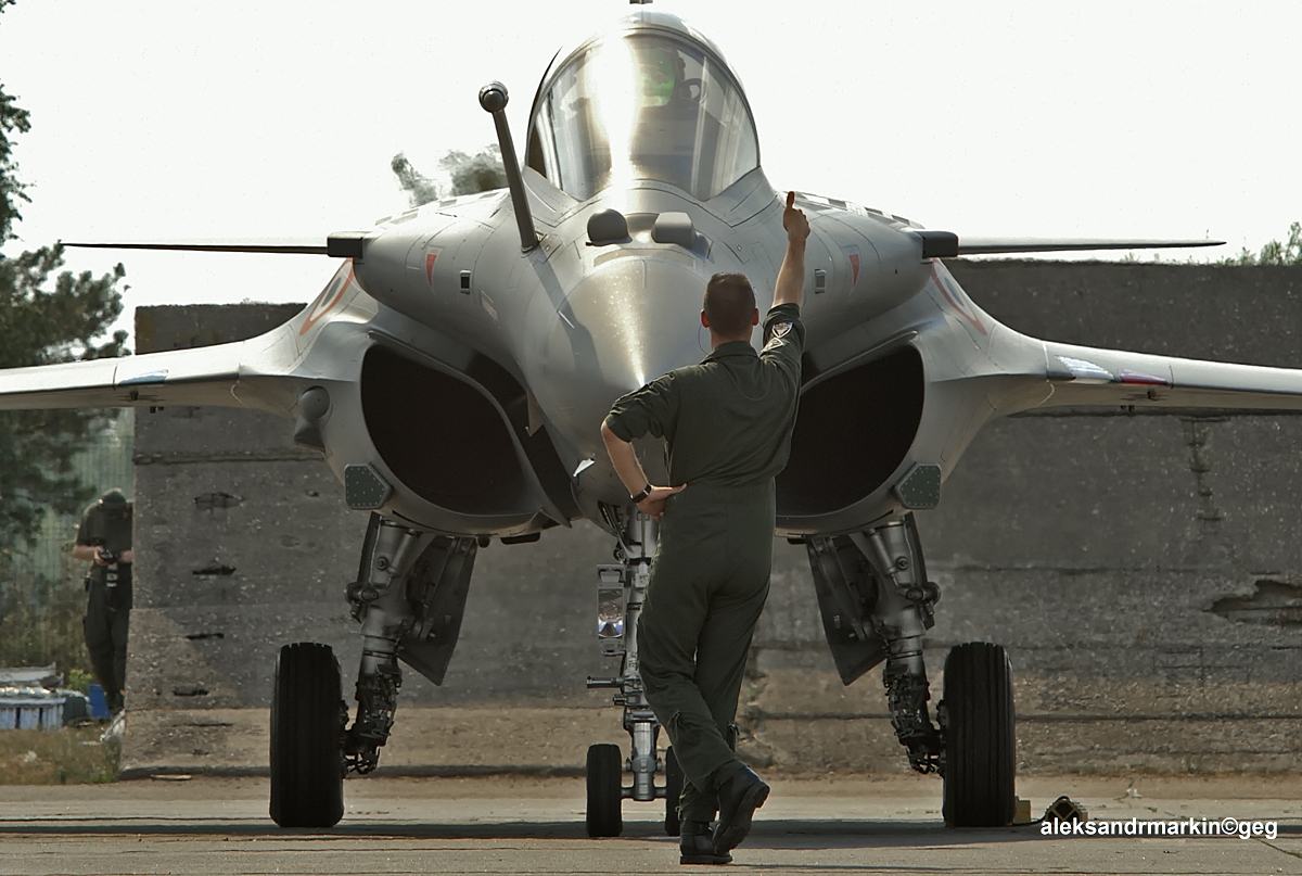 Dance for Rafale